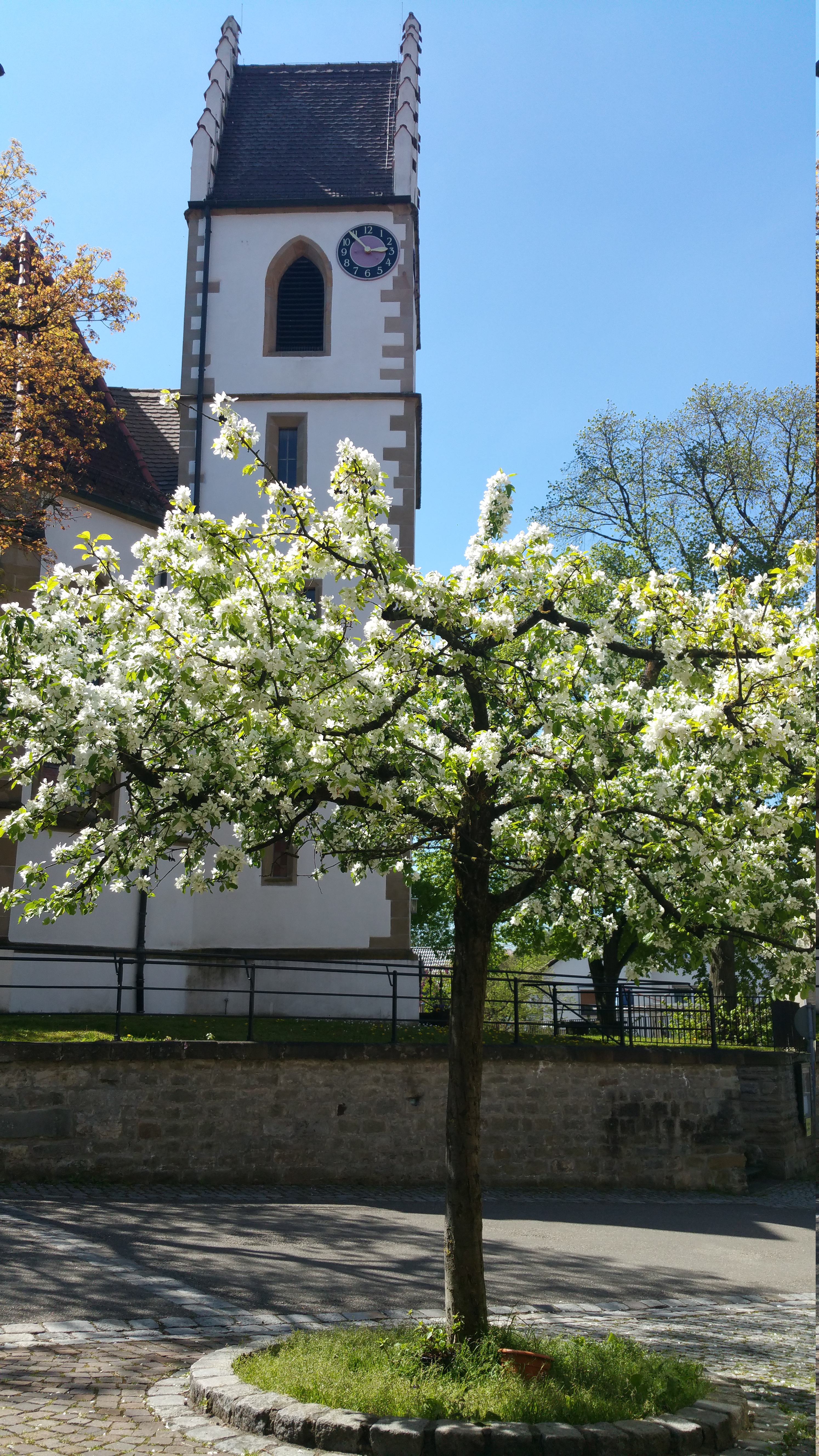 Georgskirche in Steinheim an der Murr, Ortsteil Kleinbottwar, aus dem 15. Jahrhundert im spätgotischen Stil.